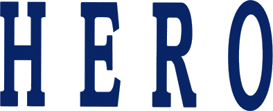 HERO（ドラマ）のロゴ